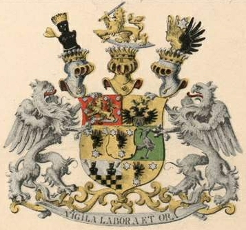 Bergi (Päri) suguvõsa krahvivapp